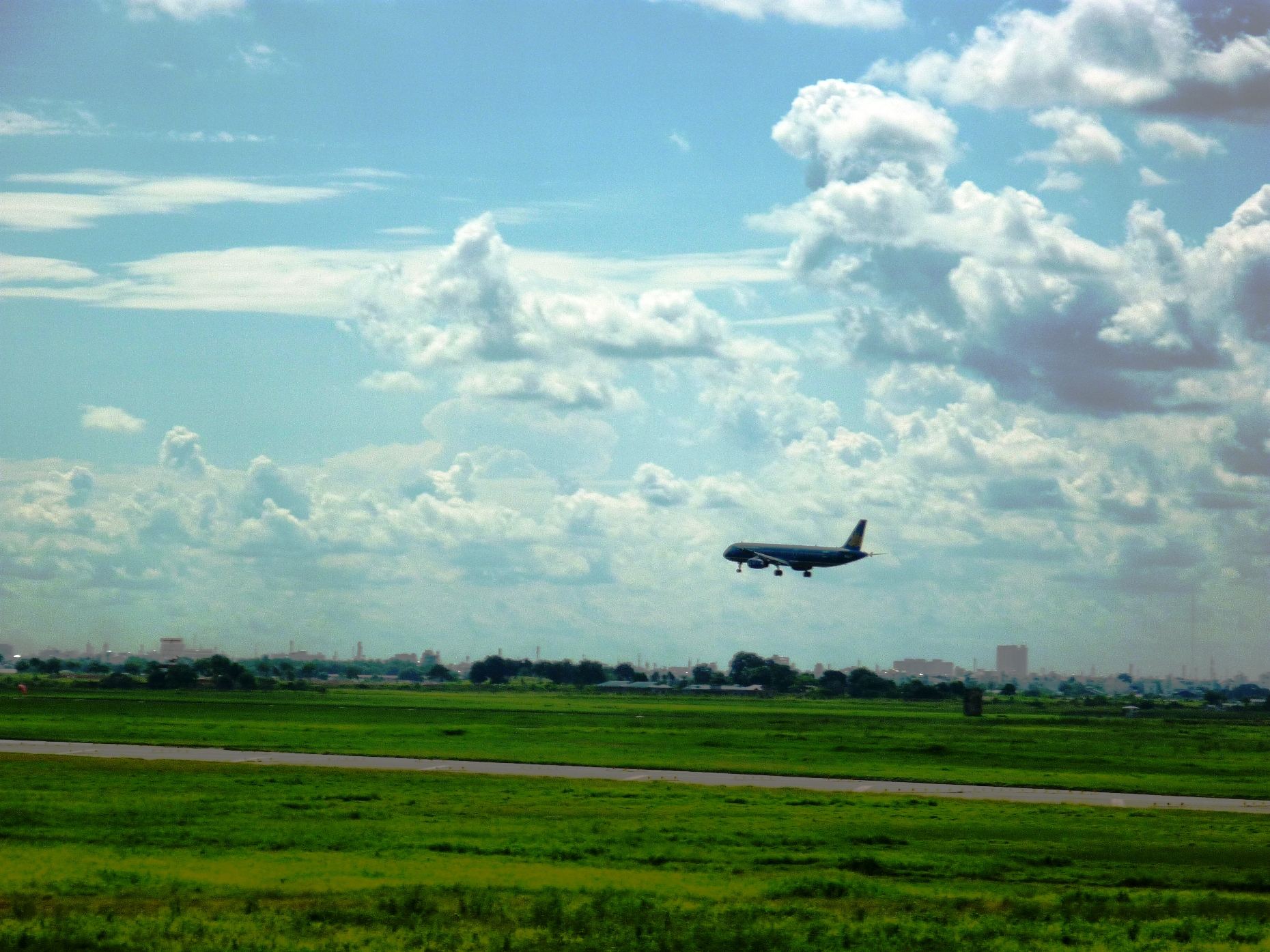 Máy bay của Vietnam Airlines đang hạ cánh xuống sân bay Tân Sơn Nhất